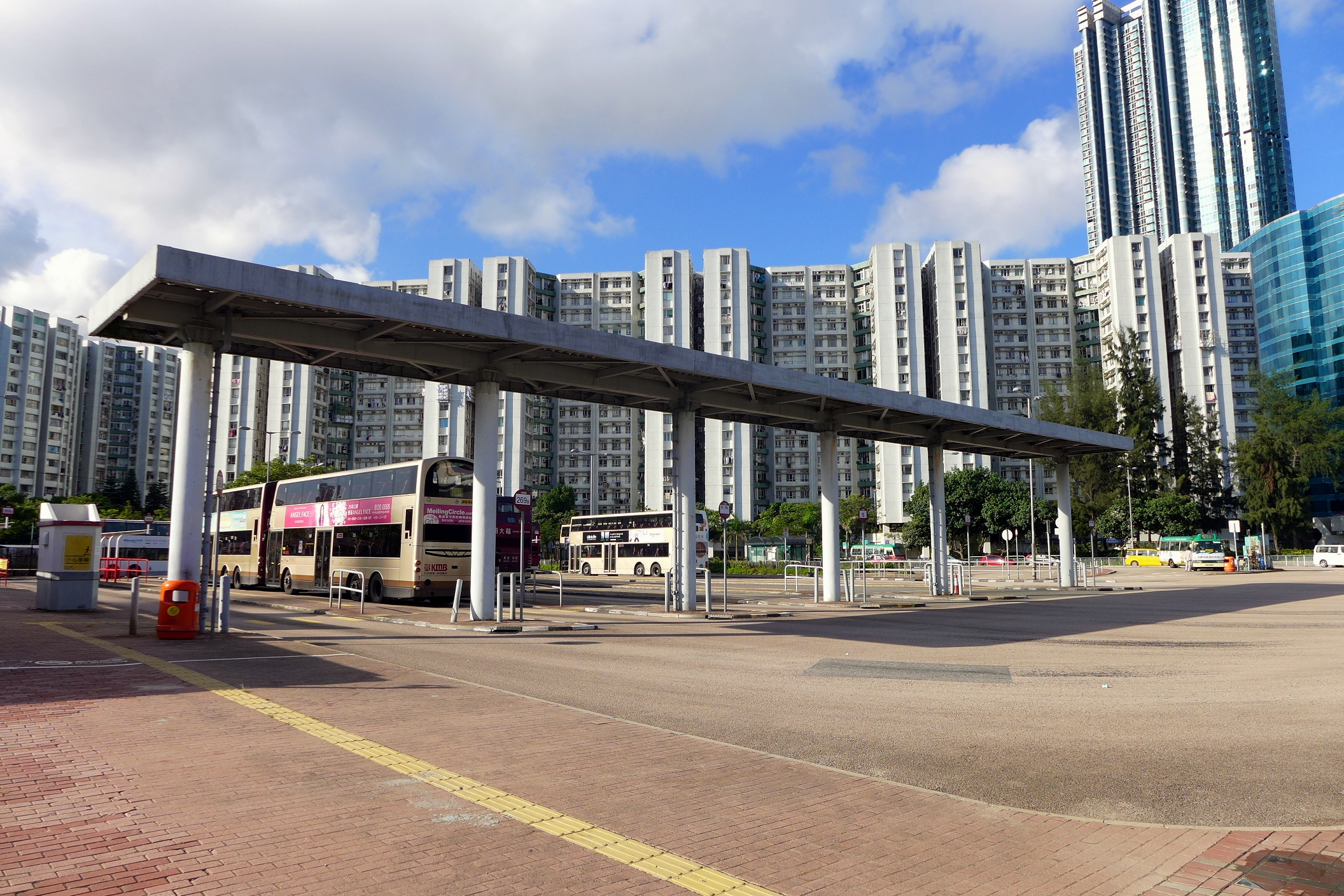 Hung Hom Pier Bus Terminal